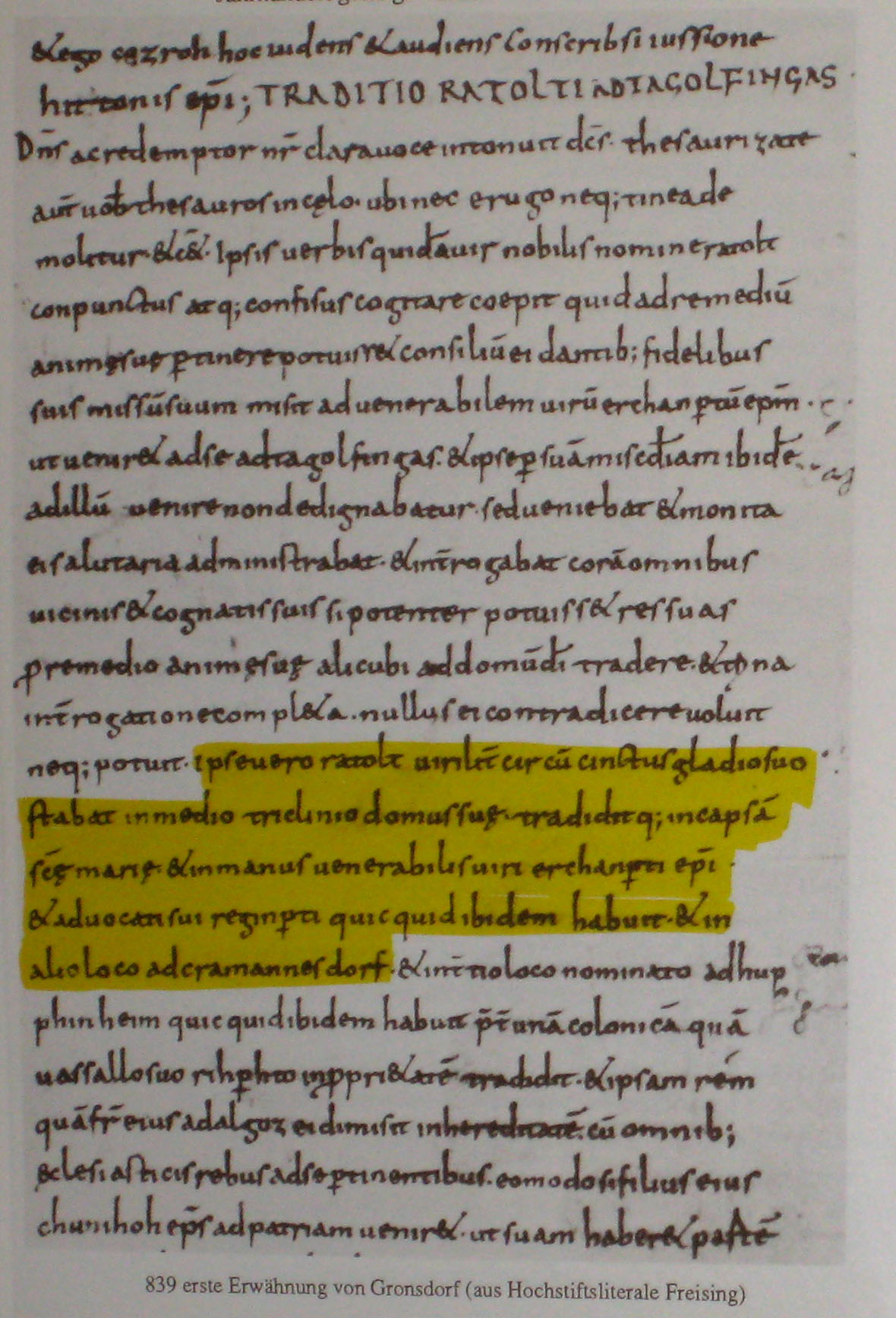 Wiedergabe der Urkunde über das Dorf Gronsdorf von 839 aus den Freisinger Traditionen